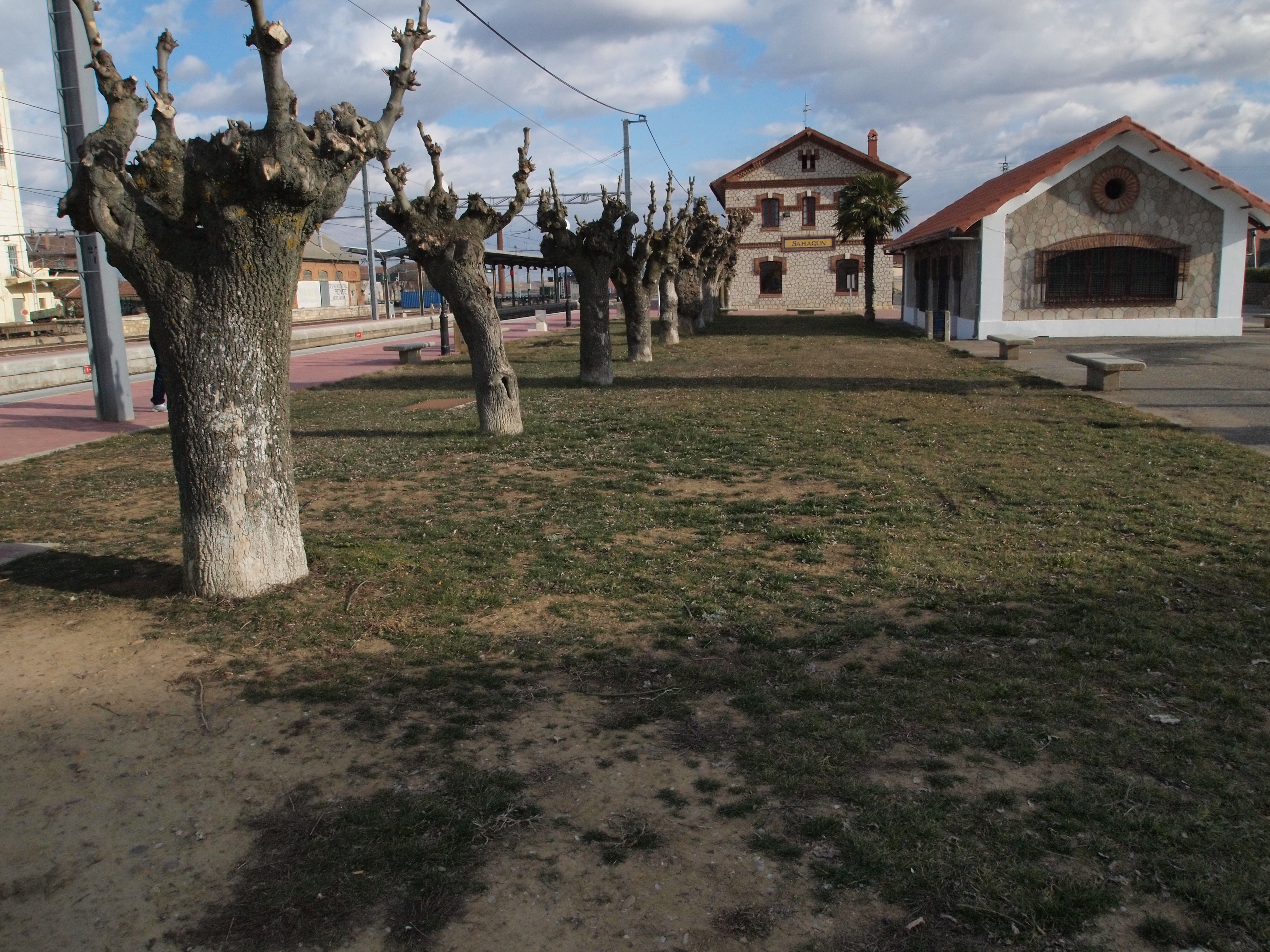 Estación de Sahagún.